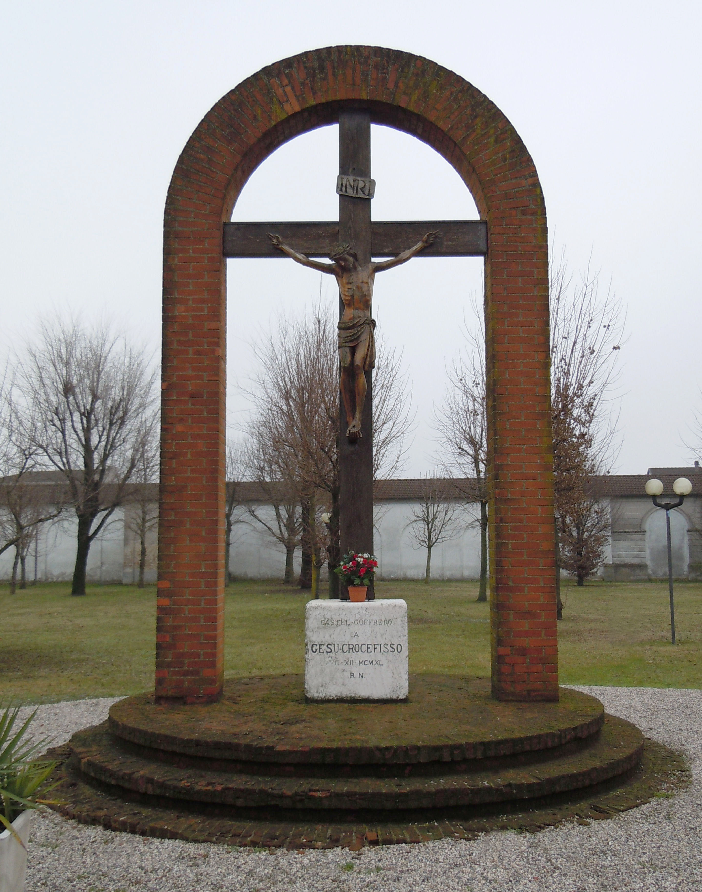 Castel Goffredo, il crocefisso.